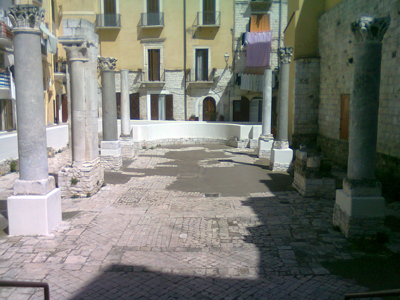 Sono io l'autore della fotografia, da me scattata con il mio smartphone la mattina del 6 aprile 2013. Vi si vedono i resti dell'antica chiesa di Santa Maria del Buon Consiglio a Bari vecchia, opera risalente ai secoli IX - XII - Itinerari culturali del medioevo pugliese Bari. Chiesa di Santa Maria del Buon Consiglio, mosaici pavimentali -. Si trattava di una chiesa a tre navate. In fondo, il muretto intonacato di bianco indica la collocazione dell'abside, ora non più esistente mentre sul pavimento, ribassato di circa 70 cm rispetto all'attuale sede stradale, sono ancora presenti chianche a losanghe ed alcuni mosaici. Essendo io l'autore della foto, la rilascio in licenza libera.